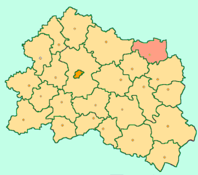 Orel Oblast map by Al Silonov Карта районов Орловской области